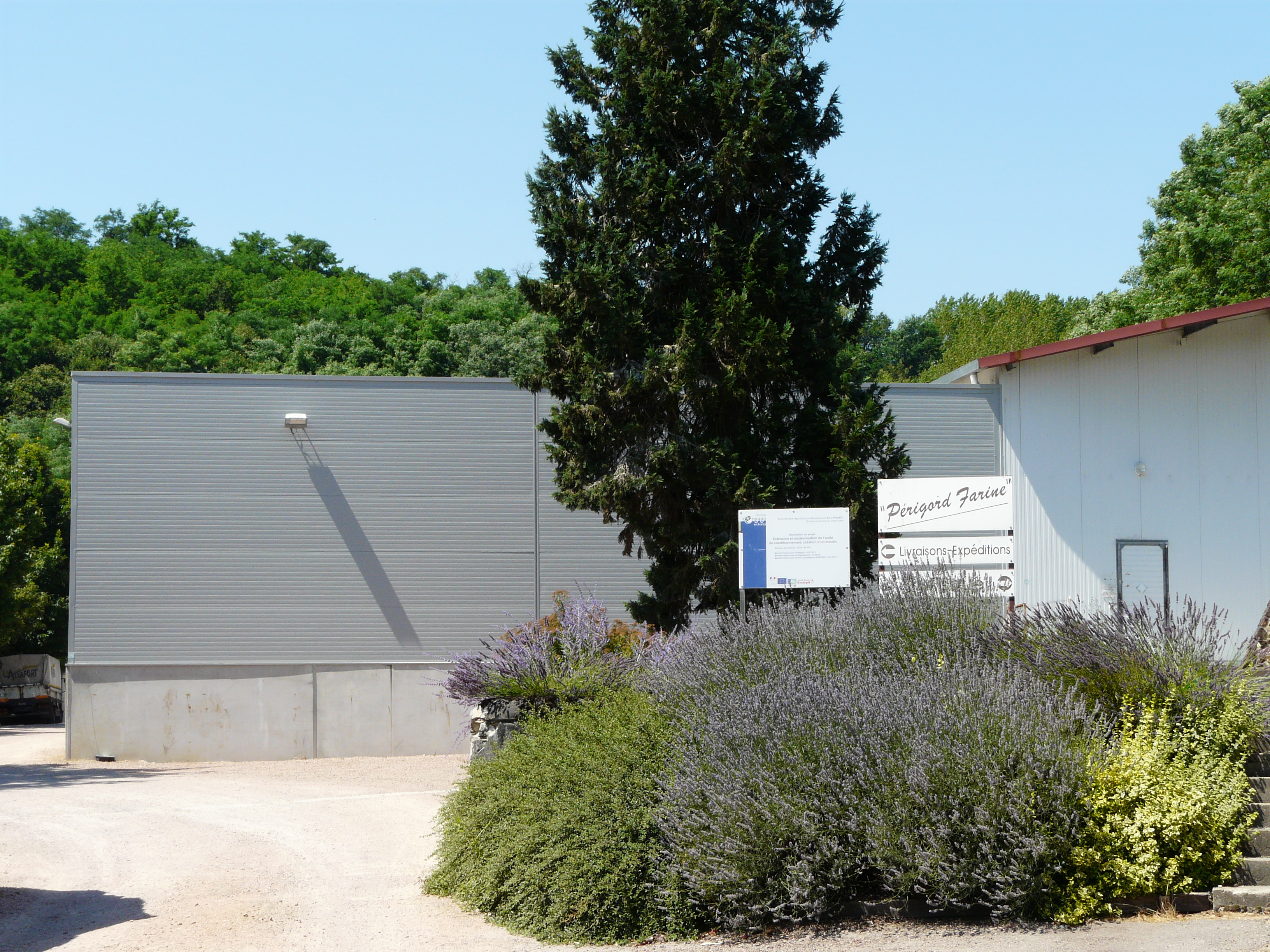 L'entrée de l'usine de « Périgord farine », Busserolles, Dordogne, France.